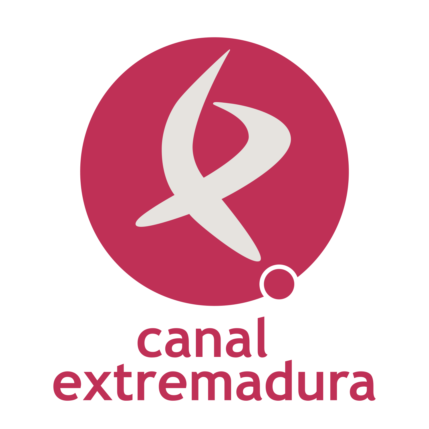 Nuevo logo CEXMA